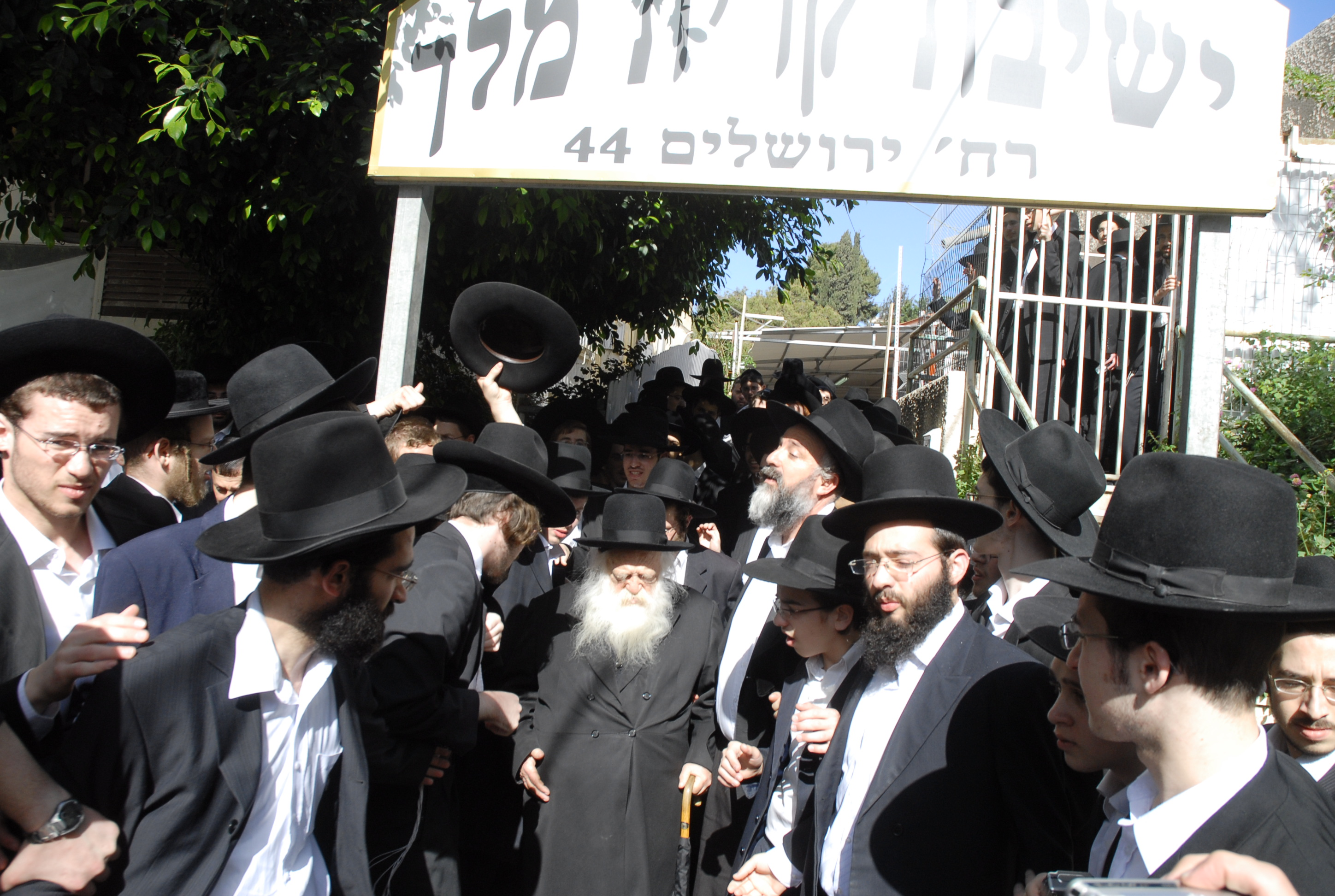 נשיא הישיבה הרב חיים קניבסקי בצאתו מהישיבה מוקף בתלמידים